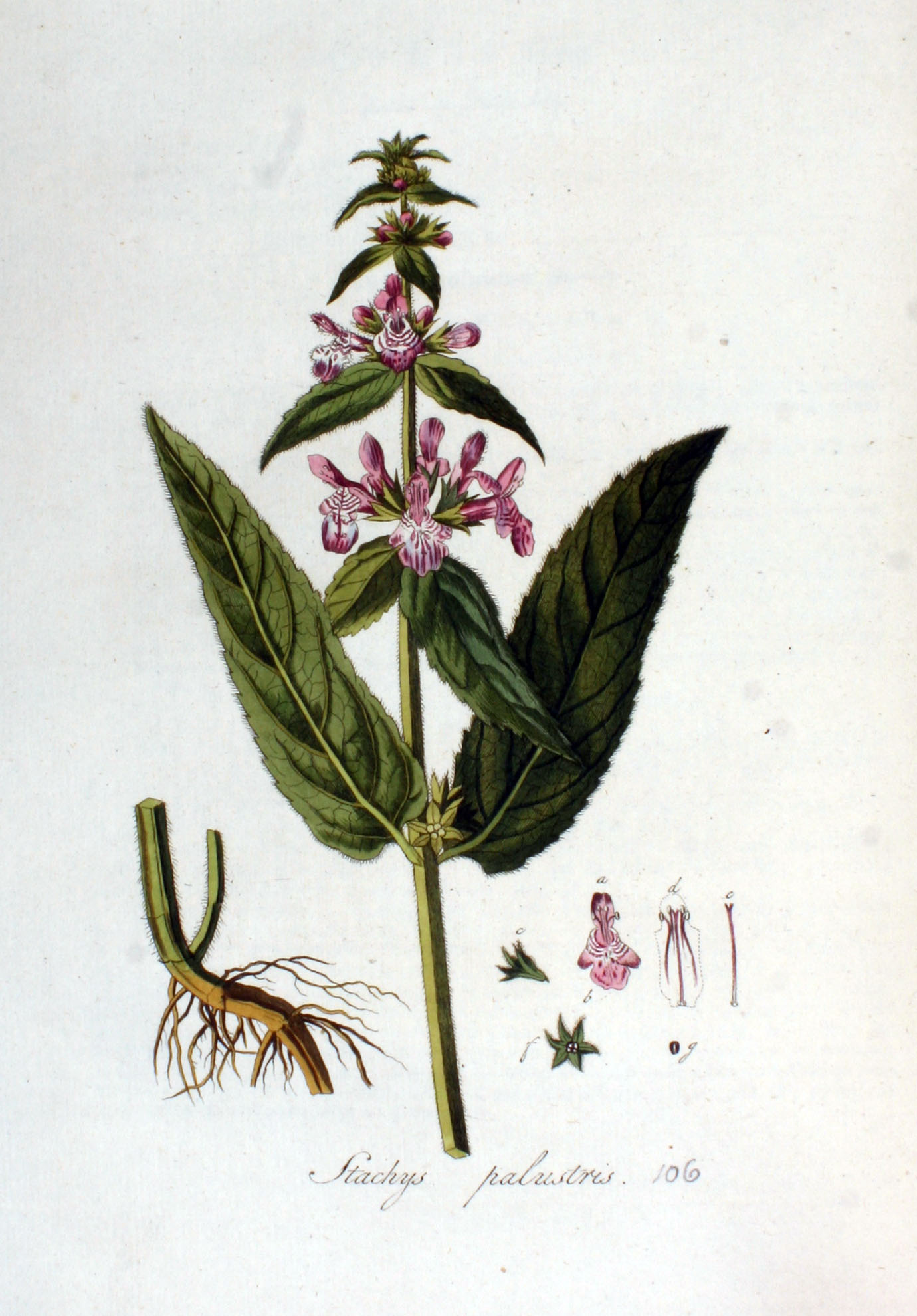 Stachys palustris L.